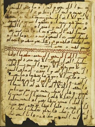 Malagasy: Sary ny Kor'any hita tao Angleterra